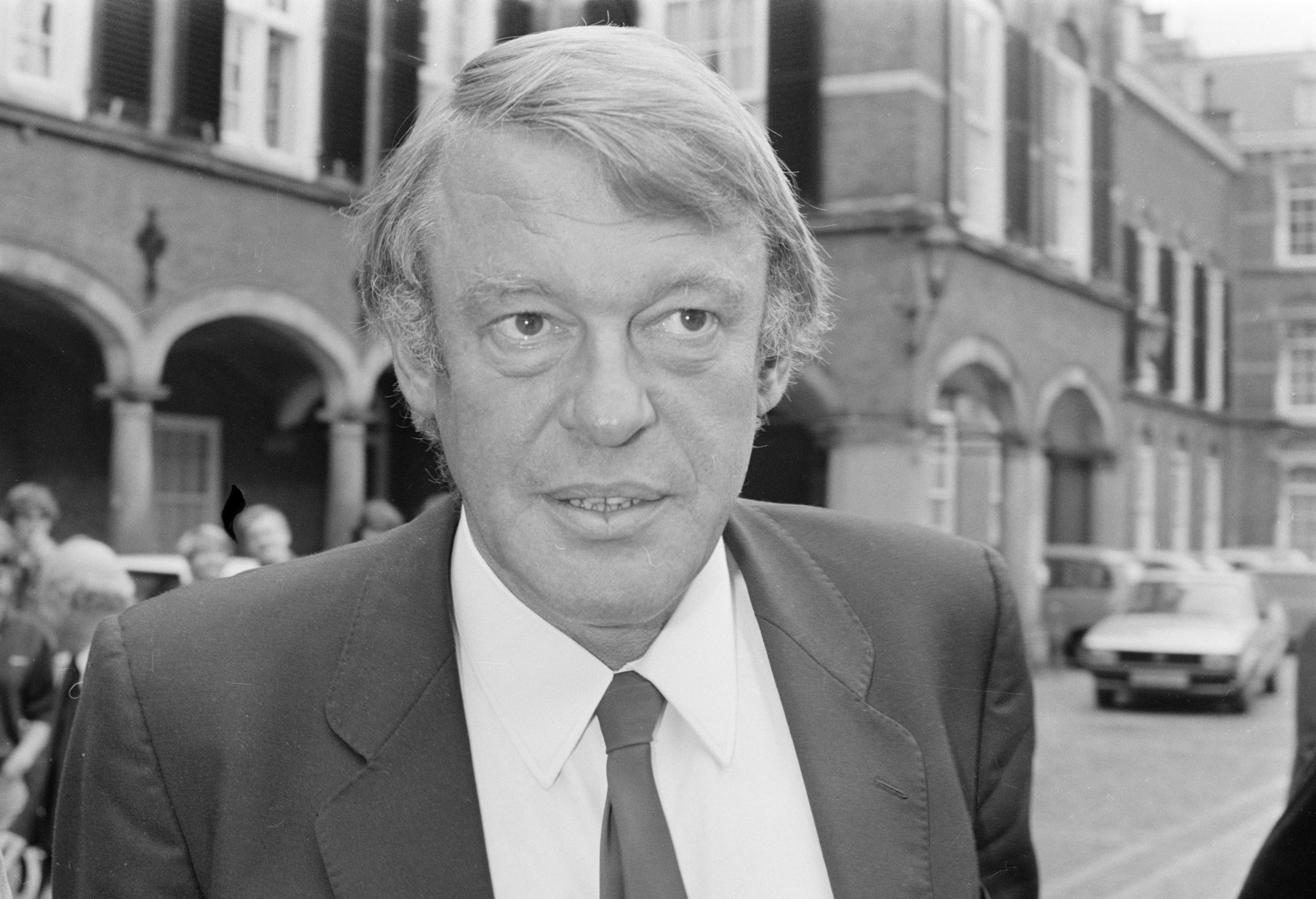 Nationaal Archief Beschrijving: De kandidaat-minister van Defensie, Hans van Mierlo. Kabinetsformatie 1981. Datum: 10 augustus 1981 Bestanddeelnummer NL-HaNA_Anefo_931-6203 Vervaardiger: Croes, Rob / Anefo URL: Voor meer informatie over het Nationaal Archief: Voor meer foto's uit deze en andere collecties, bezoek onze Beeldbank:, U kunt ons helpen onze kennis van de fotocollecties te verrijken door tags en commentaren toe te voegen. Herkent u mensen of locaties of heeft u een bijzonder verhaal te vertellen bij één van de foto's, laat dan een reactie achter (als u ingelogd bent bij Flickr) of stuur een mailtje naar